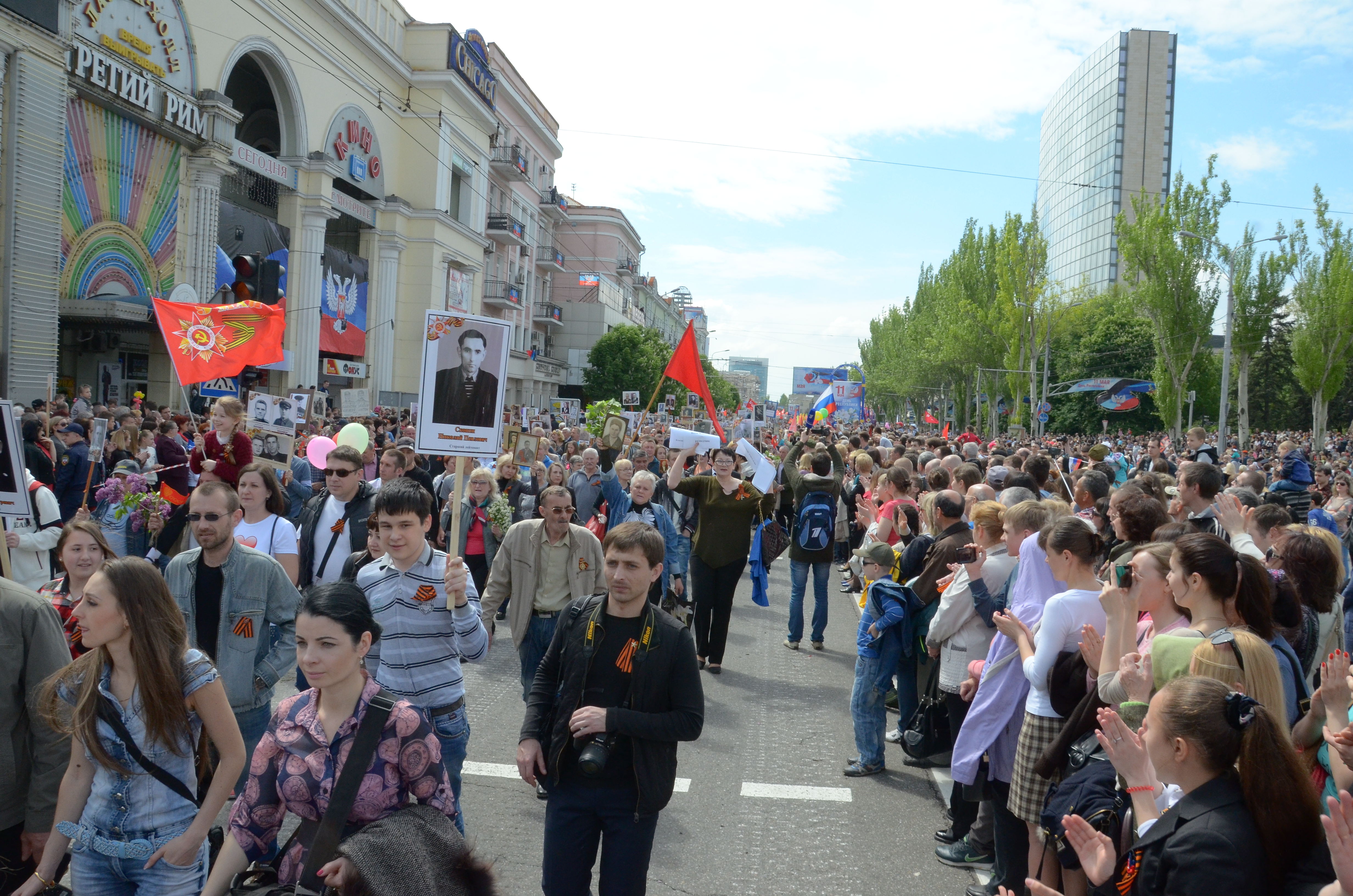 День Победы в Донецке